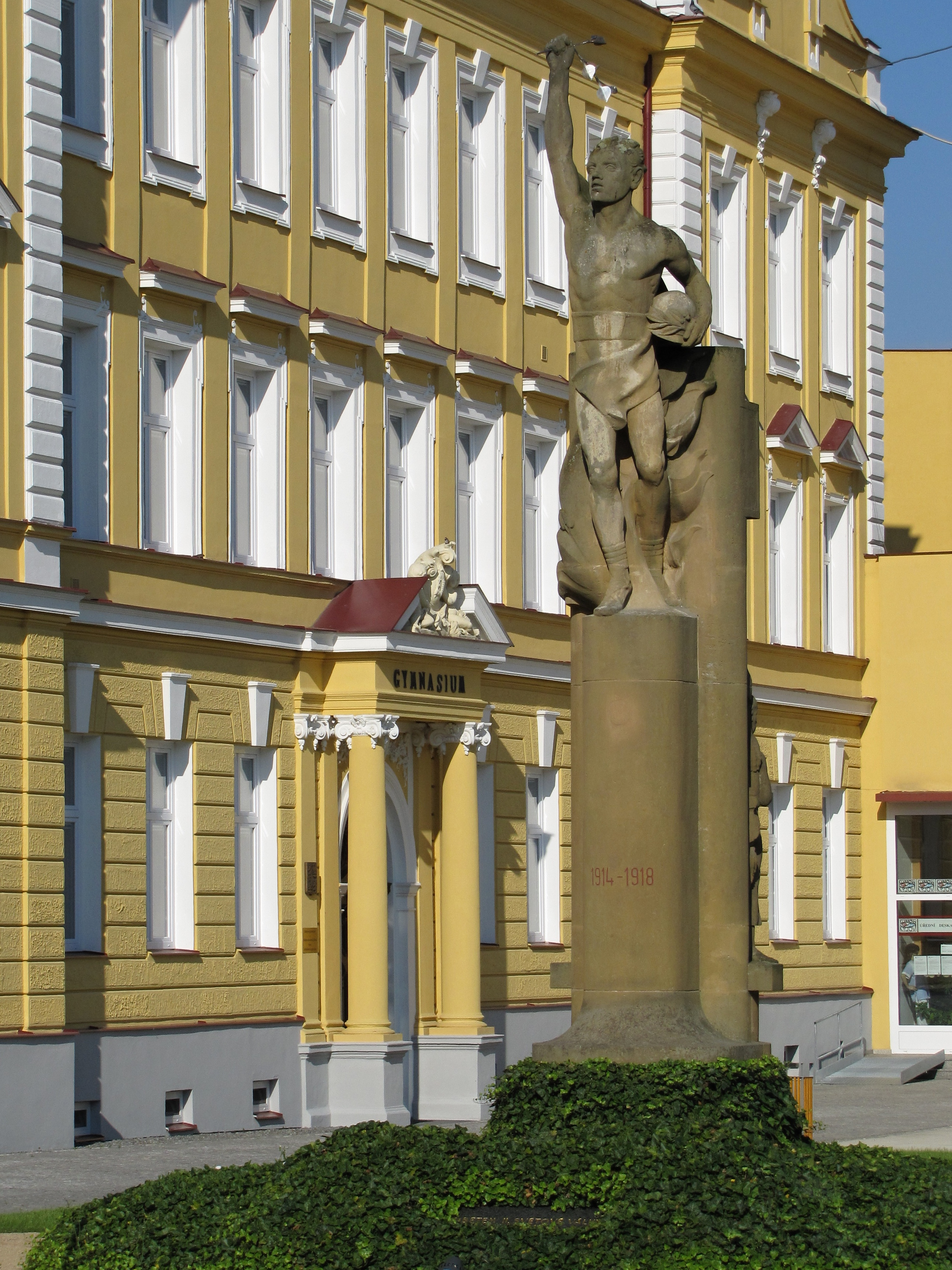 Pomník padlým v 1. a 2. světové válce před budovou Klvaňova gymnázia v Kyjově